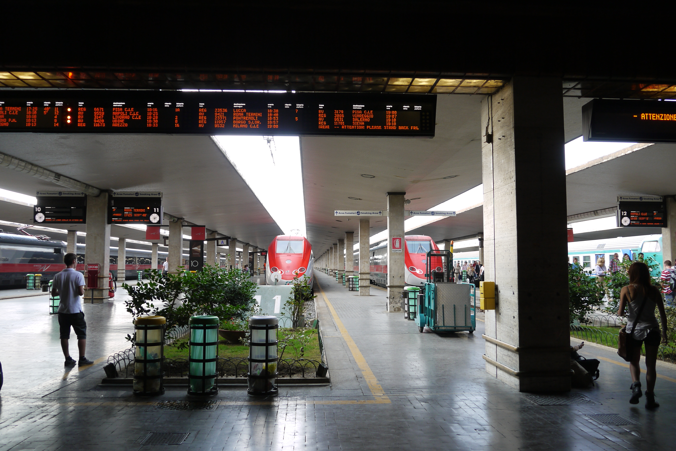 義大利國鐵 Trenitalia - Firenze S.M.N站 義大利 Firenze 翡冷翠